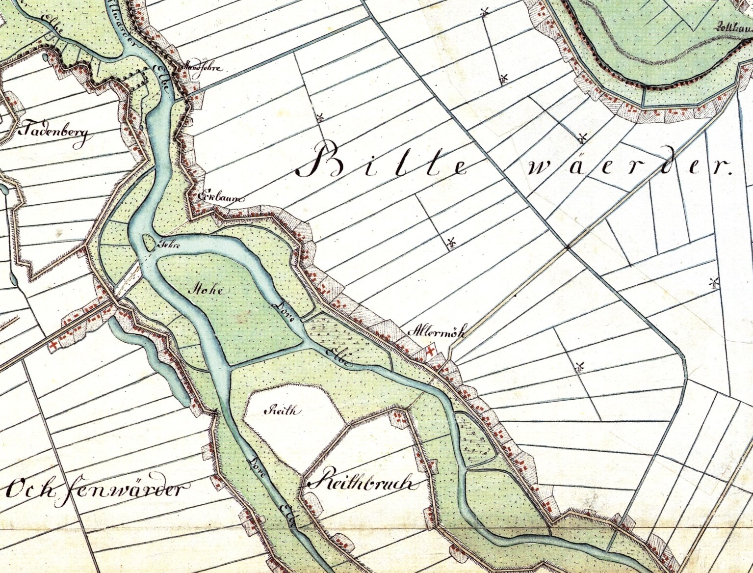 Bergedorf, Reinbek. Aufgenommen in den Jahren 1789 bis 1796 unter der Direktion des Majors Gustav Adolf von Varendorf durch Offiziere des Schleswigschen Infanterieregiments